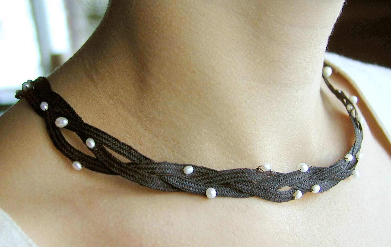 Halsbånd av menneskehår, med perler. Kunstner: Anna Sparr